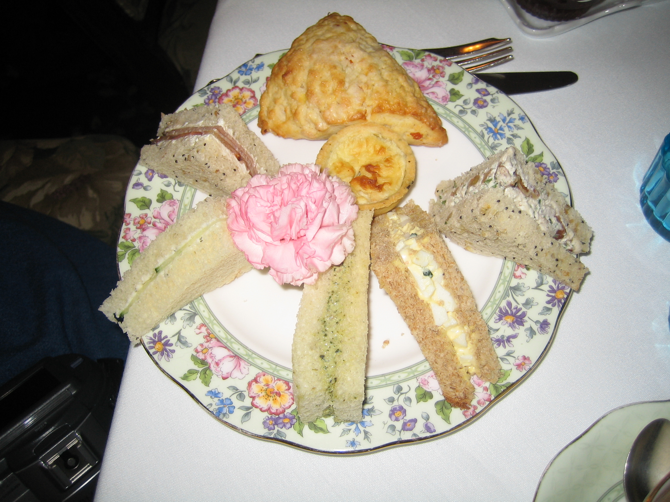 yum!